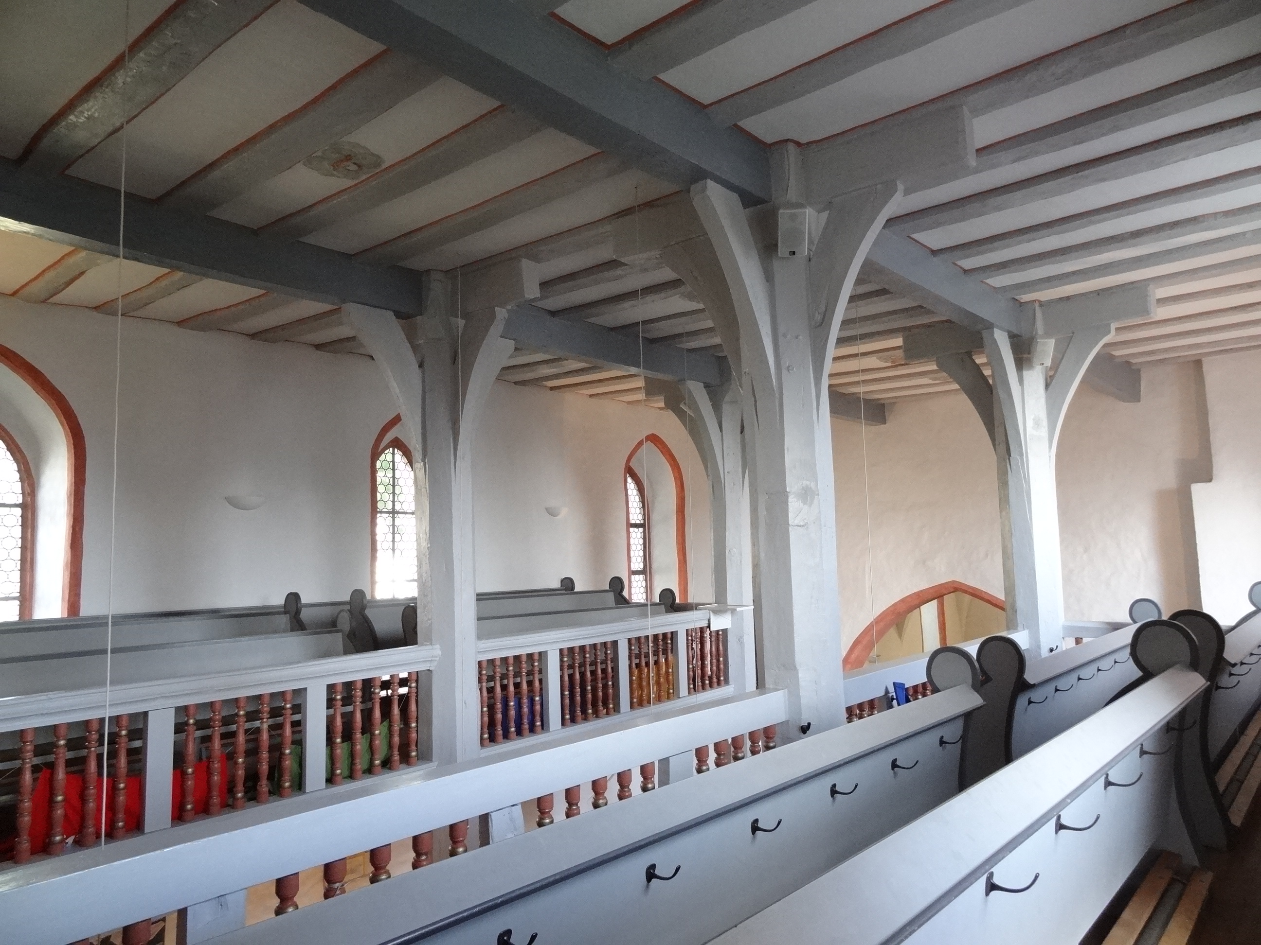 Margarethenkirche (Krofdorf)